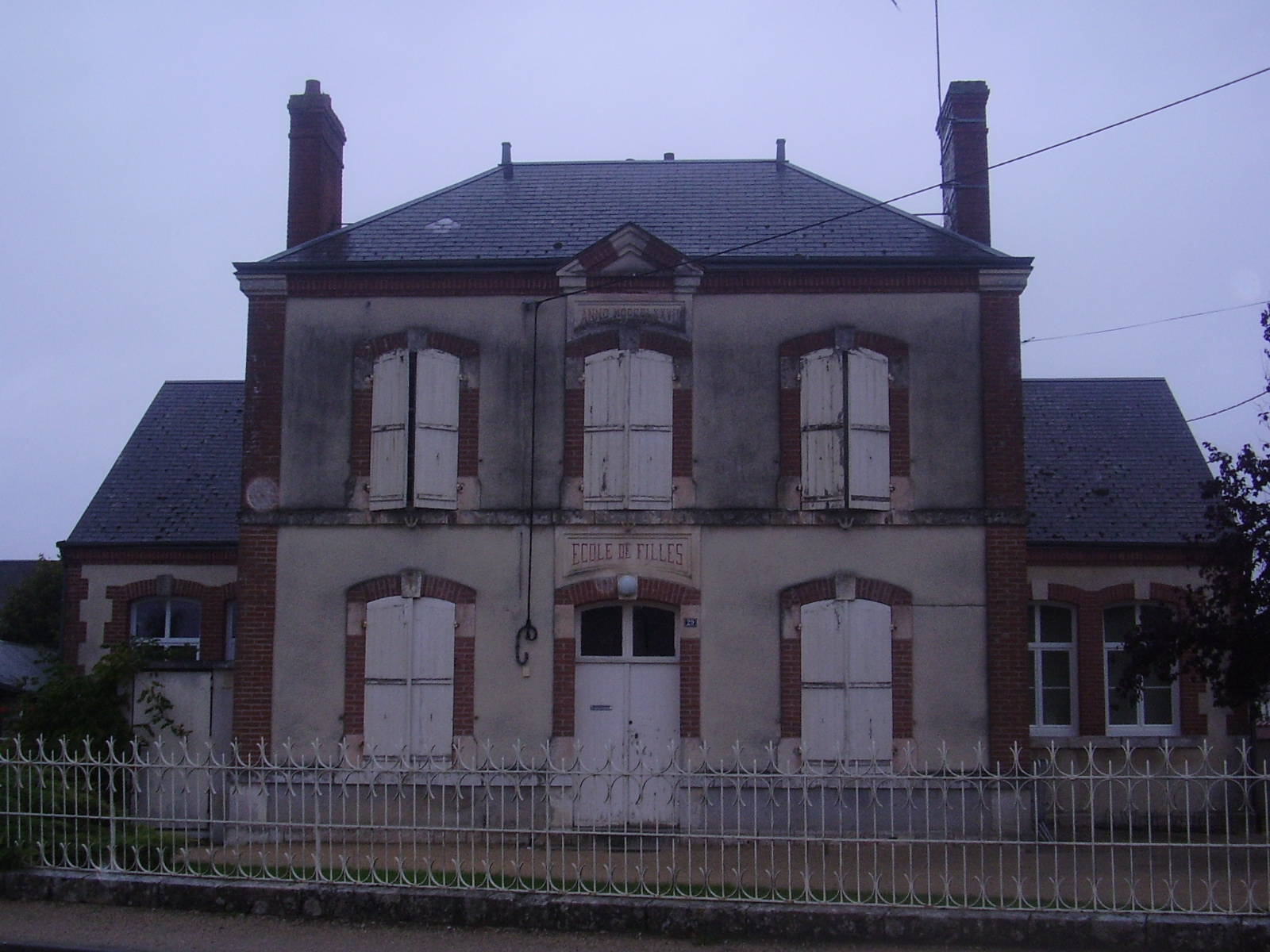 école matenelle de Cravant (Loiret)